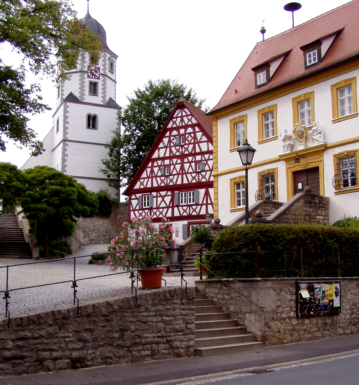 Rathausplatz mit Kirchturm, Pfarrhaus und Rathaus von Winterhausen / Main